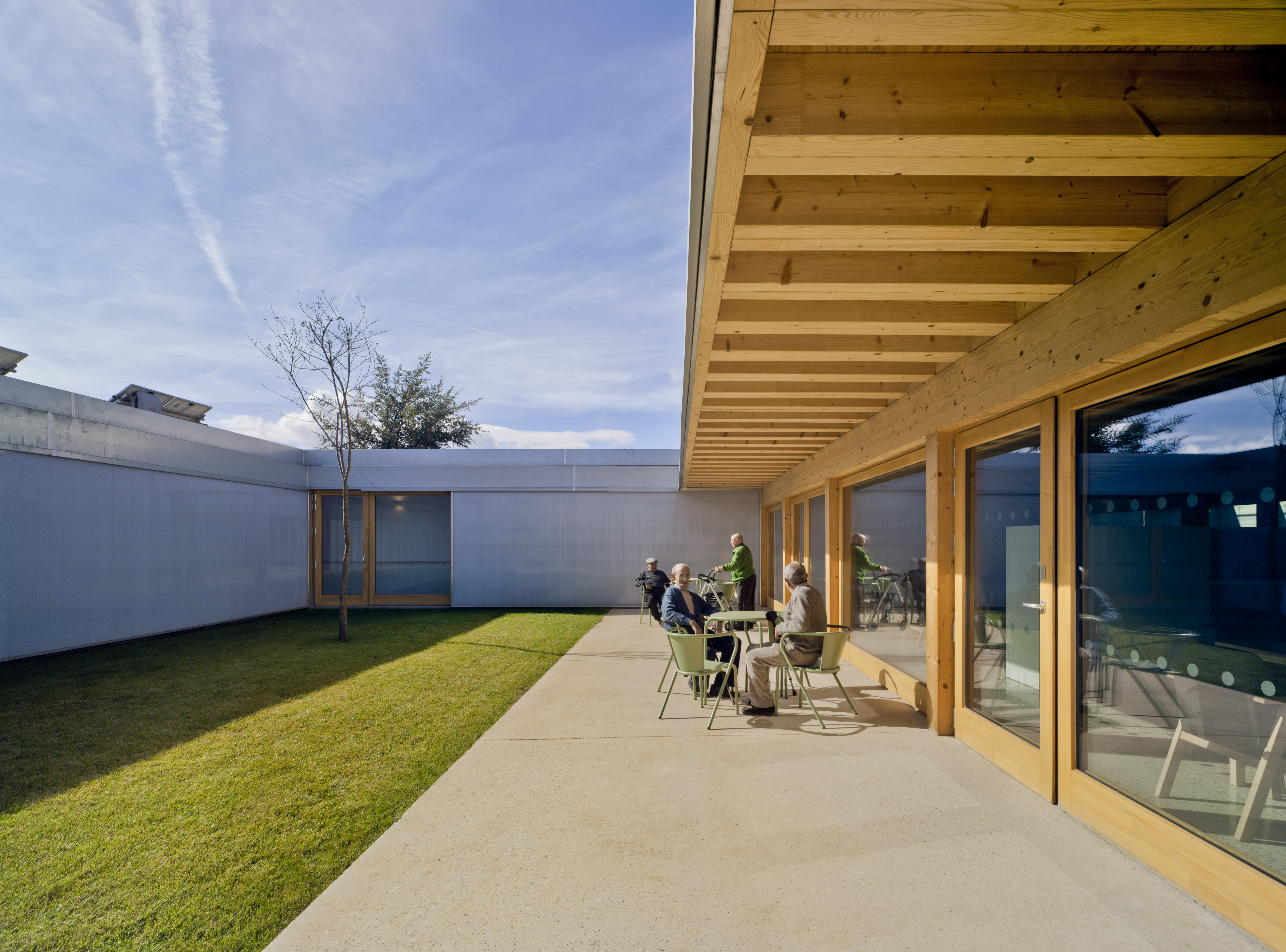 Primera Residencia de Ancianos Passivhaus de España en Camarzana de Tera